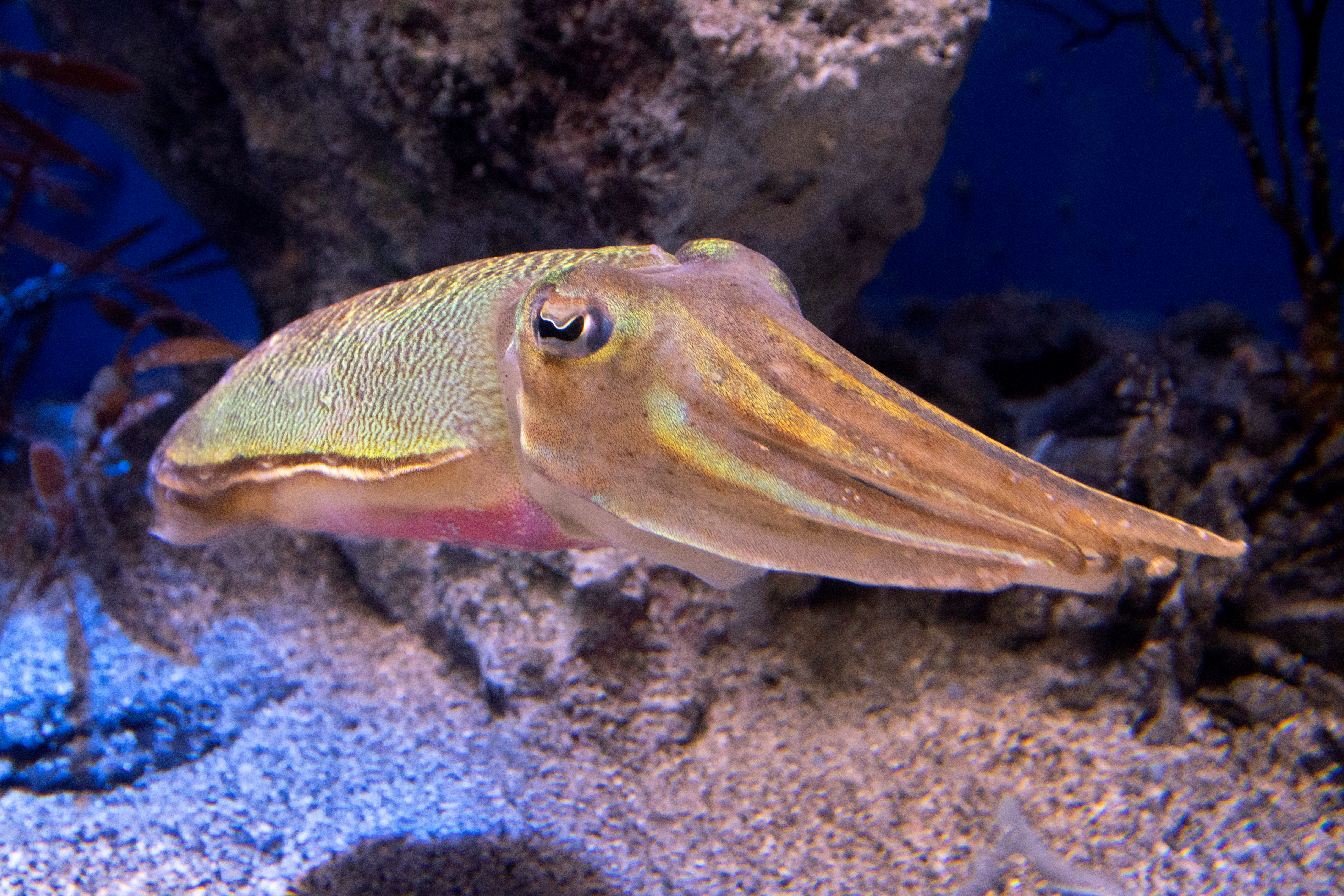 カミナリイカ (学名:Sepia lycidas) 撮影地：新江ノ島水族館